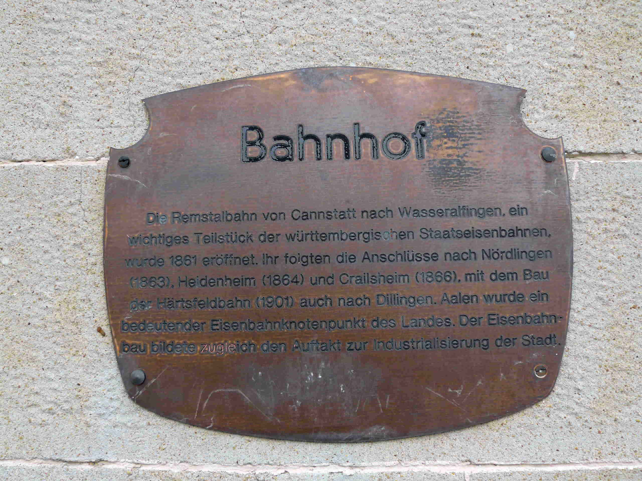 Info-Schild am Aalener Bahnhof